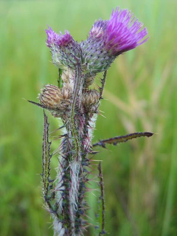 Sumpf-Kratzdistel Cirsium palustre, Müritz-Gebiet